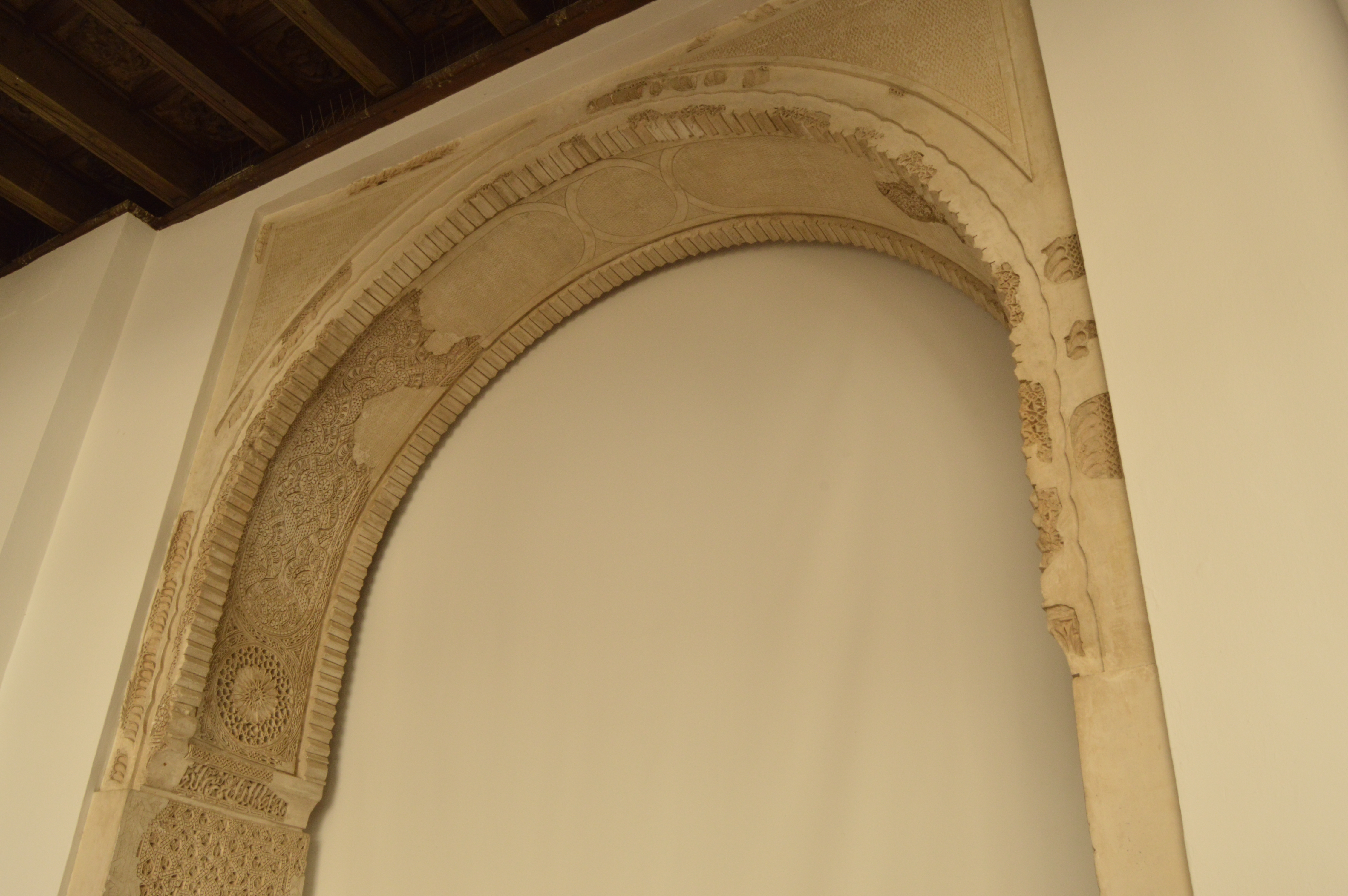 Arco palacio de los Paez